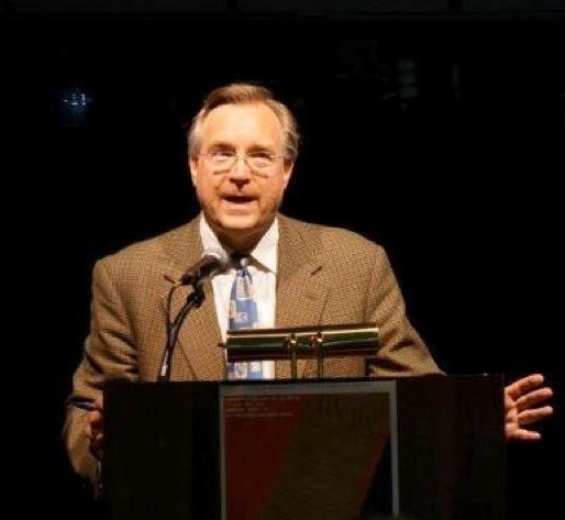 Бак Райан, разработчик концепции Маэстро